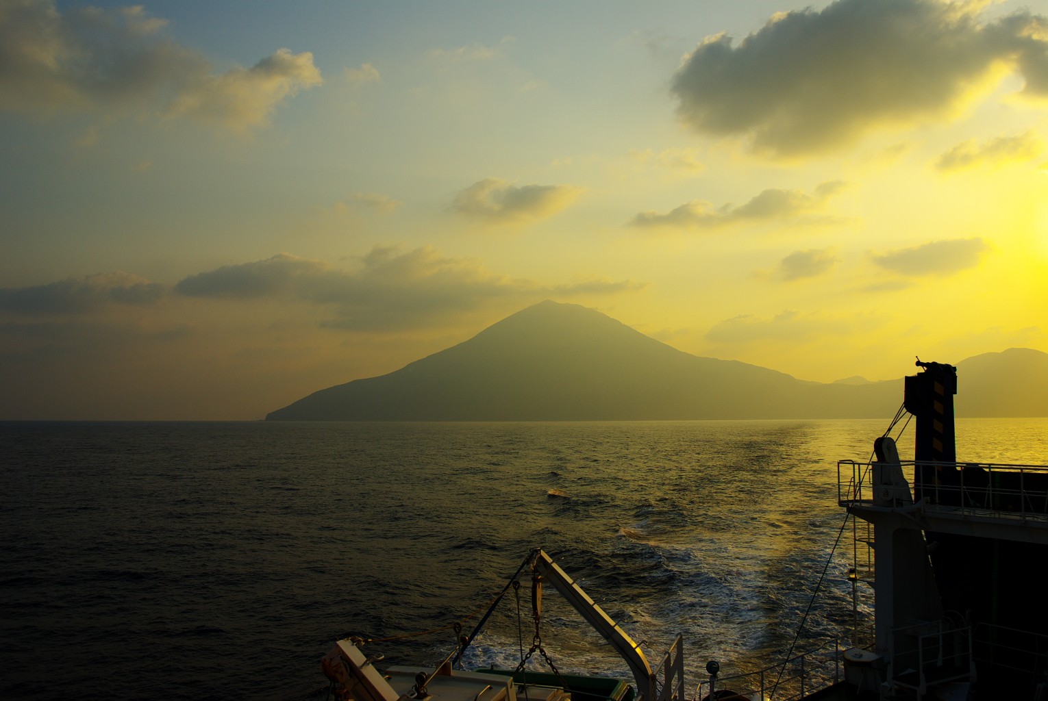 トカラ列島中之島の夜明け。フェリー「としま」より撮影。